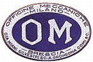 OM-Officine-Meccaniche-Milano-Logo